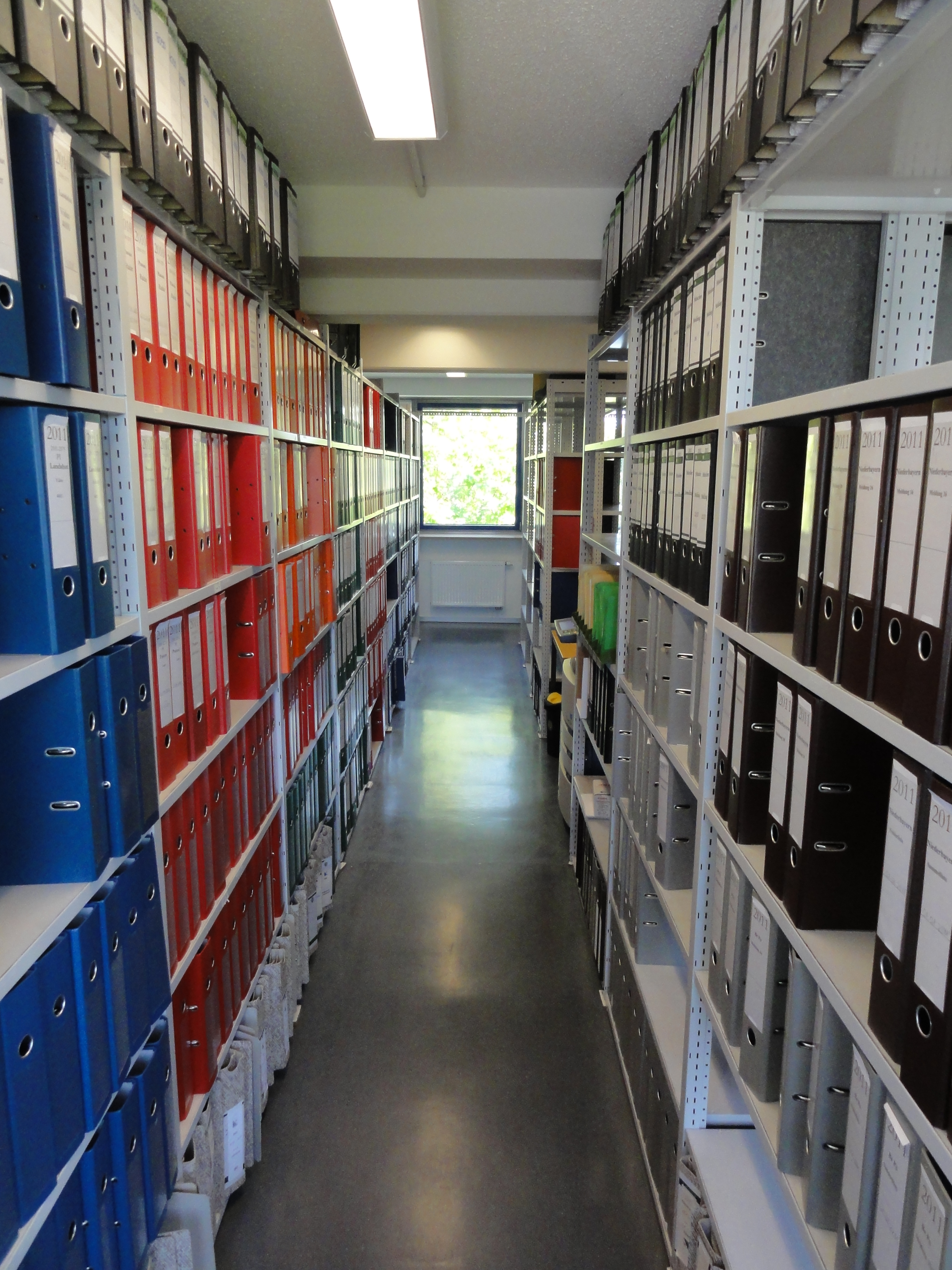 Straubing, ZBS: - Aktenraum Info GPS data may be inaccurate. EXIF data regarding date and time may be inaccurate.